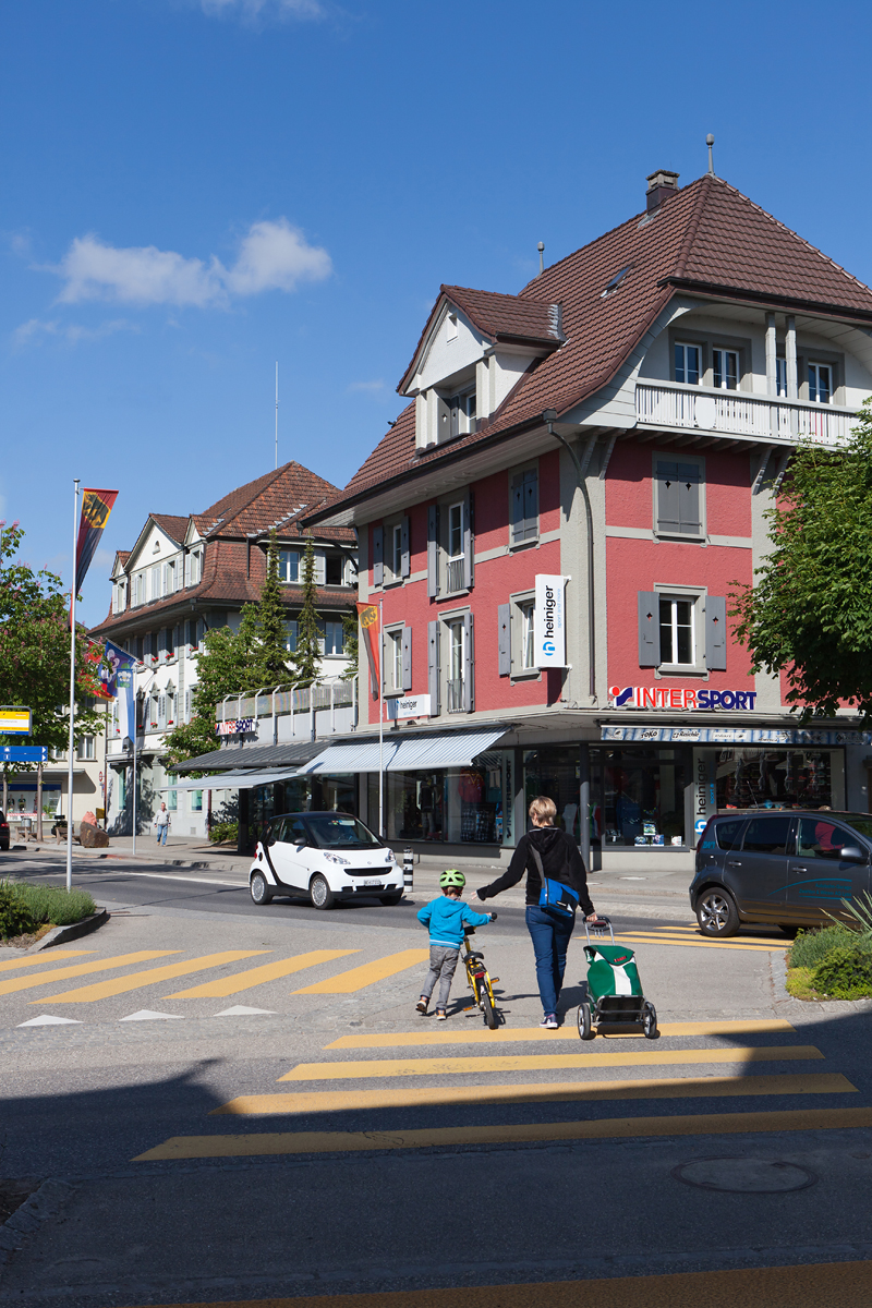 Eingangs Marktplatz beim Hirschenplatz-Kreisel in Lyss (BE)